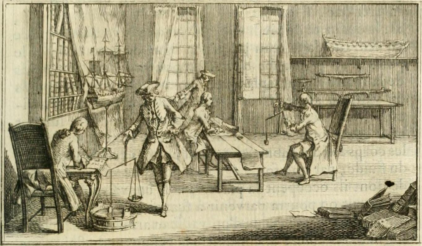 Dessin réalisé en 1752 pour la première édition de Éléments de l'architecture navale ou Traité pratique de la construction des vaisseaux. Ouvrage de Duhamel du Monceau.